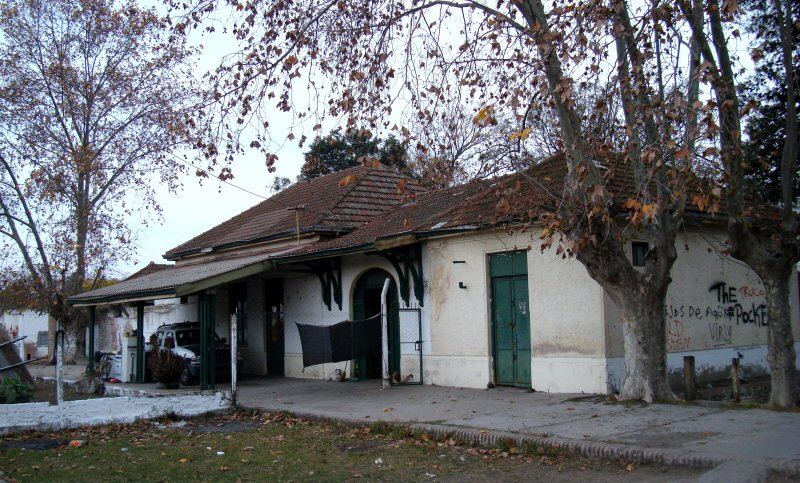 Estación Gobernador Monteverde, FCGB, ex FCPBA